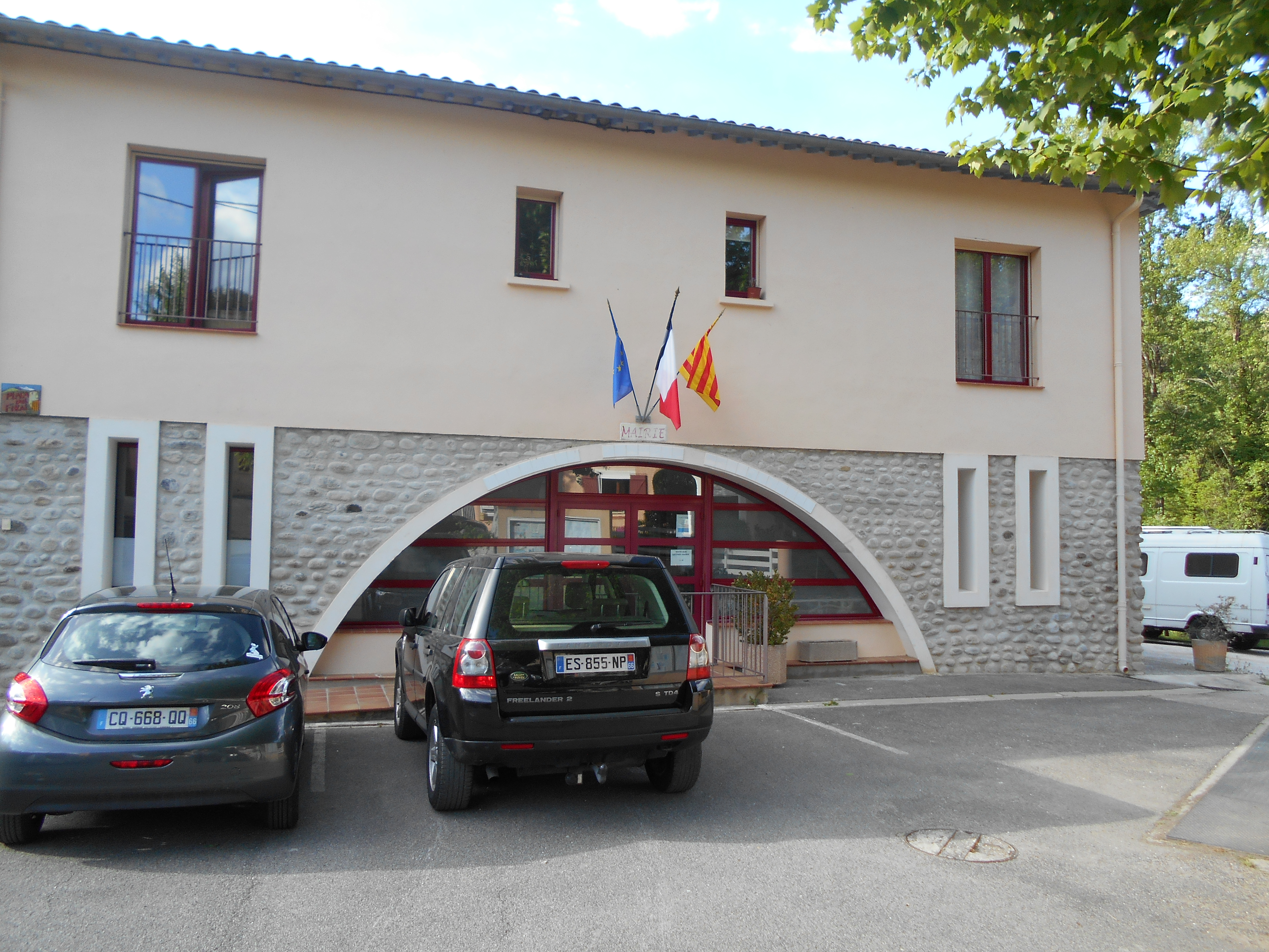 Casa del Comú de Finestret